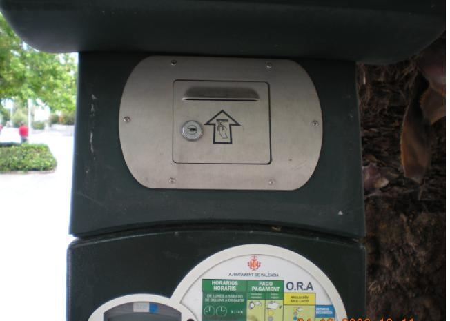 Frontal de un parquímetro unido mediante remaches ciegos con mandril de estiramiento